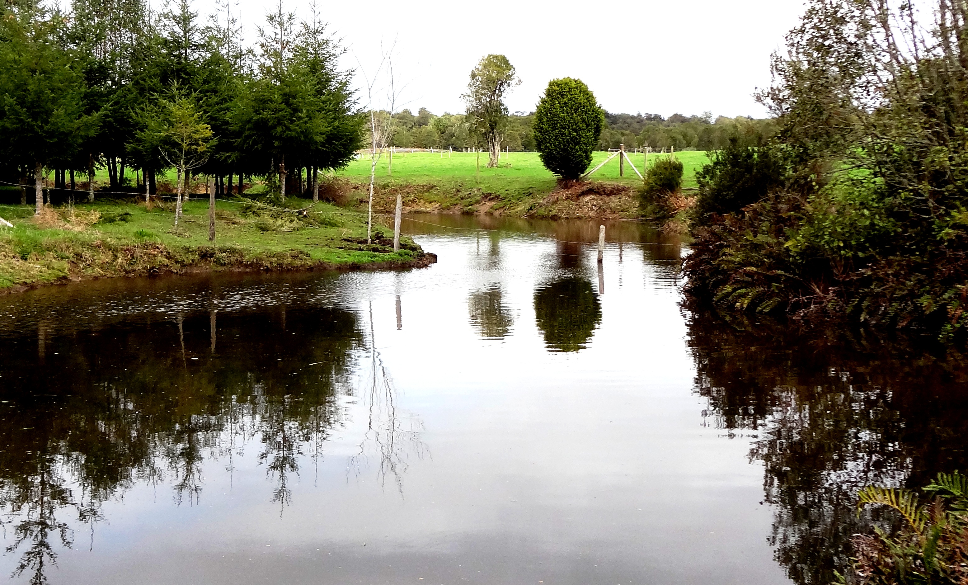 Sitios arqueológicos Monte Verde y Chinchihuapi This is a photo of a national monument in Chile: 2012